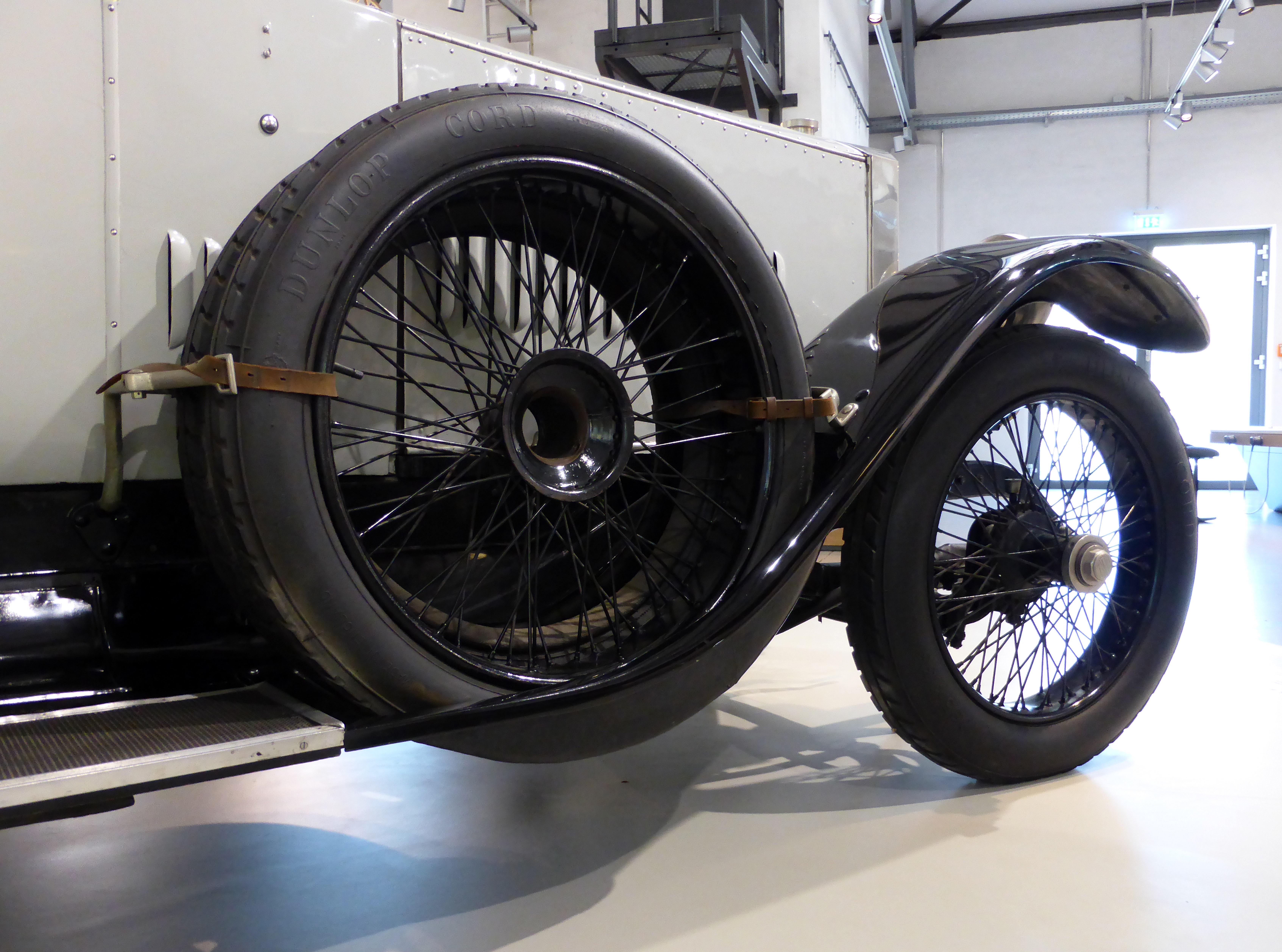 Benz, 21/50 PS, Baujahr 1914 (Typ E3) Sonderanfertigung der Karosseriebaufirma Josef Neuss in Berlin-Halensee für Karl Max von Lichnowsky im Deutschen Technikmuseum in Berlin. Wikipedianische KulTour am 10. Oktober 2015 in der Ausstellung des Museums.